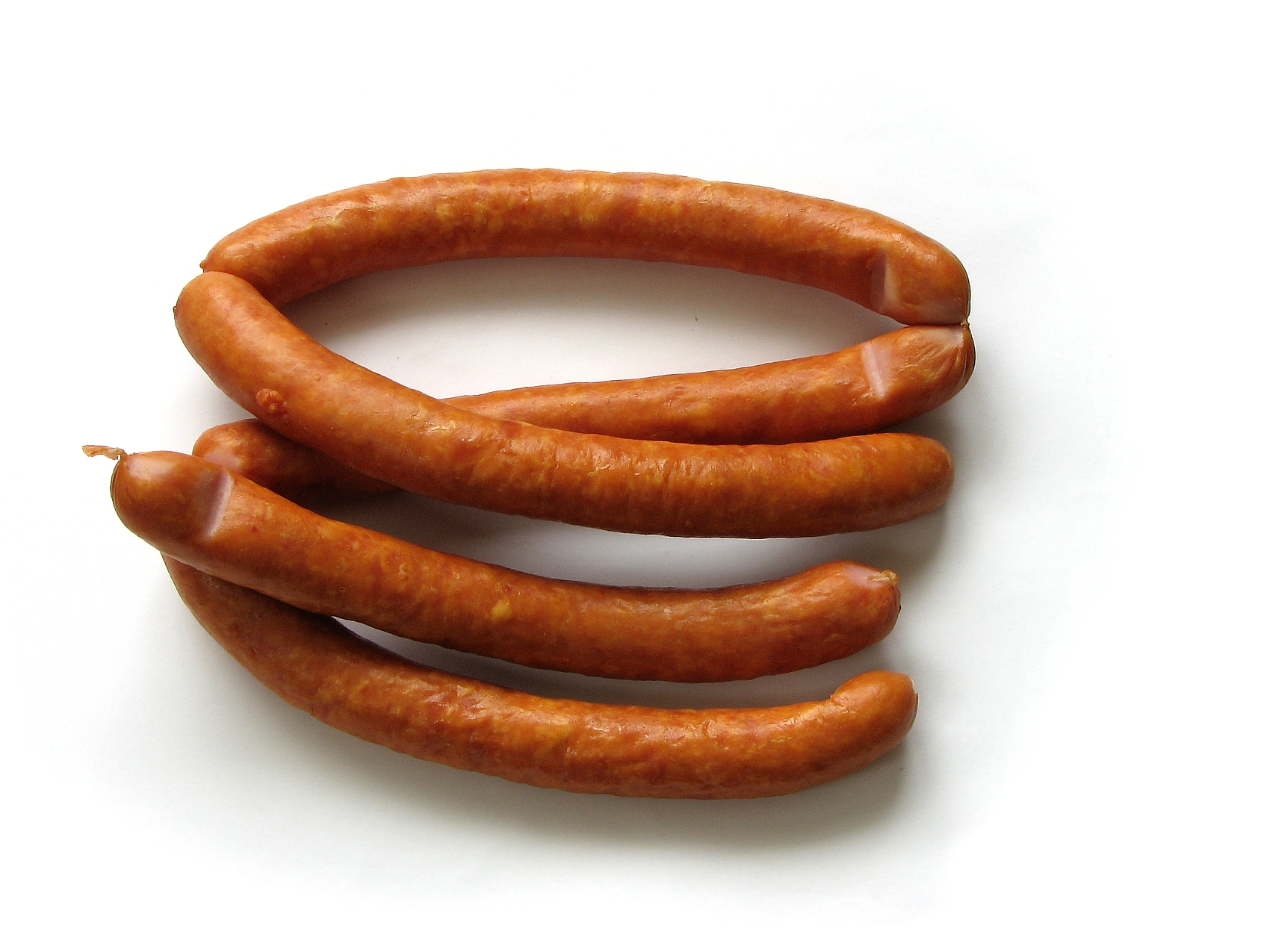 sausage, kiełbasa, kiełbaski śląskie